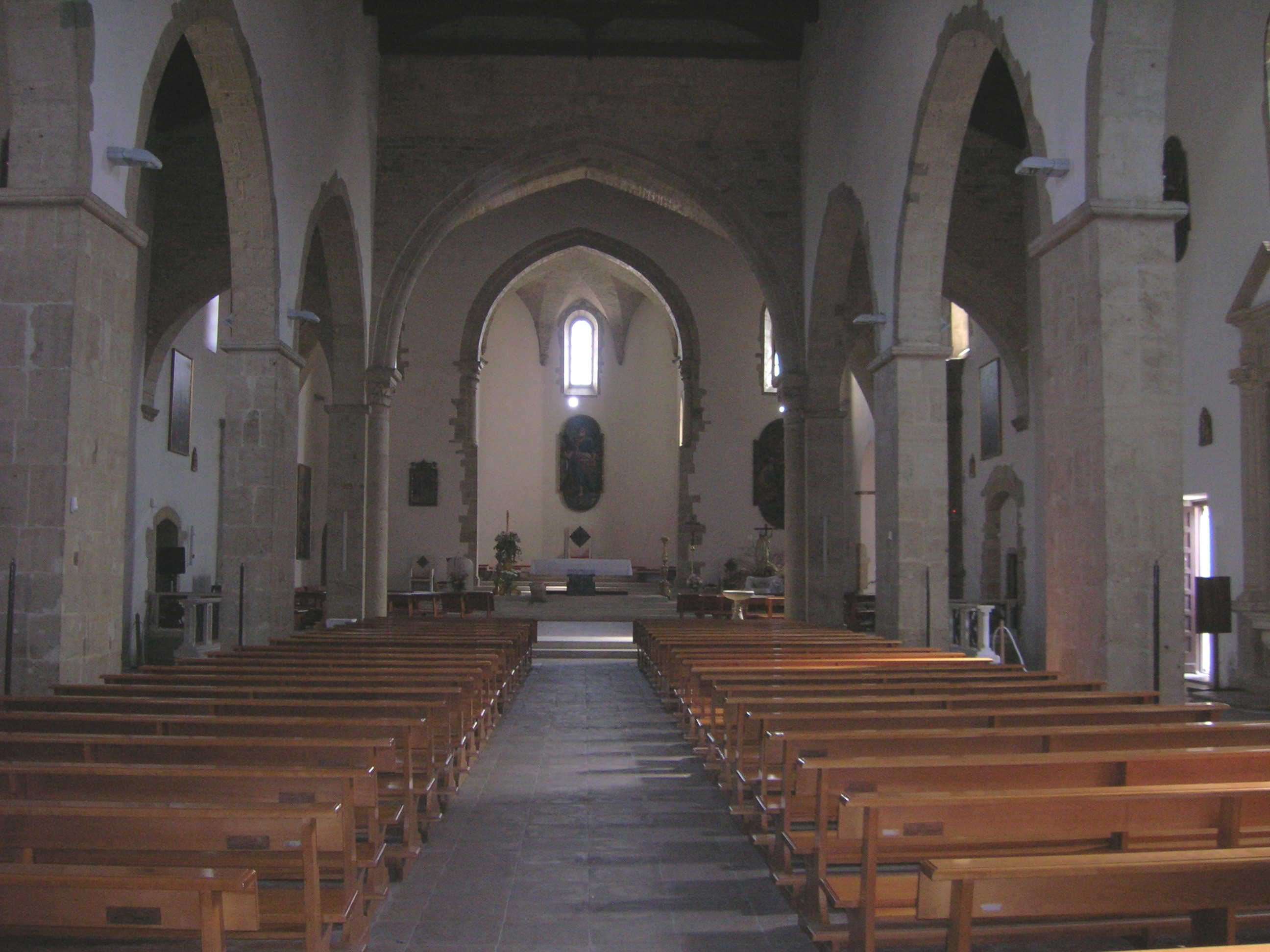 Interno della Cattedrale di Sant'Andrea, Venosa (PZ)